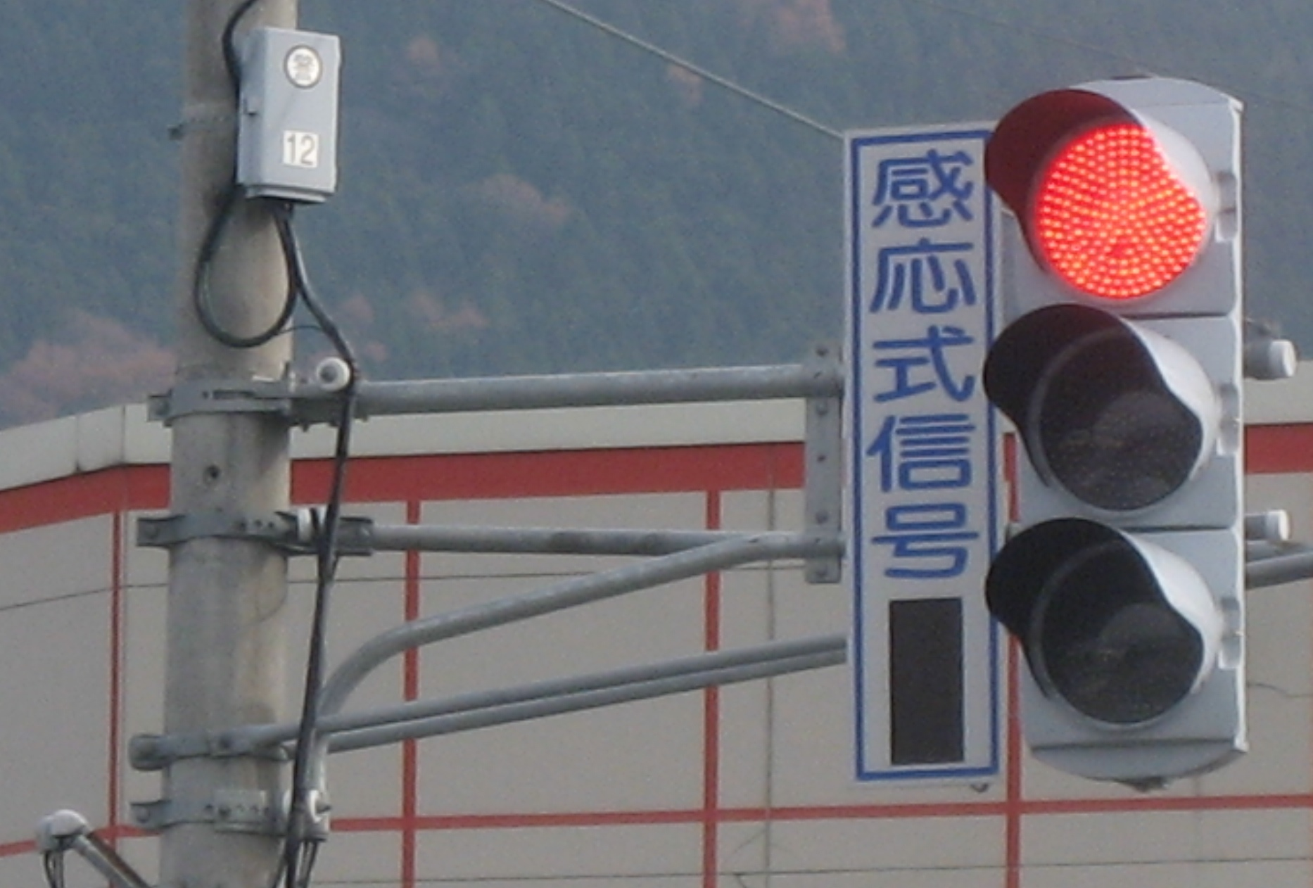 山形県白鷹町内に設置されている感応式信号表示板（「感知中」非表示）